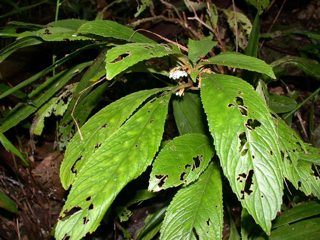 Rhynchotechum discolor：ヤマビワソウ 2004/08/11 沖縄本島北部：Okinawa Island, Japan